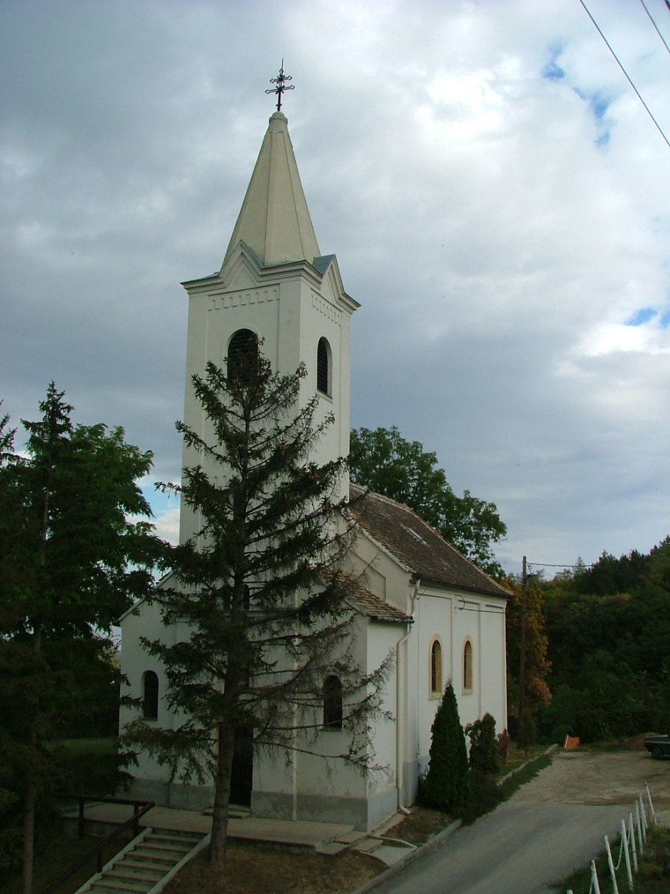 Fertőboz, Szentháromság római katolikus templom This is a photo of a monument in Hungary, Identifier: 4049